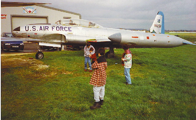 Tangmere Air Museum